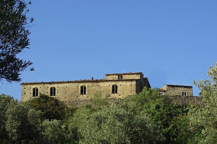 Casino